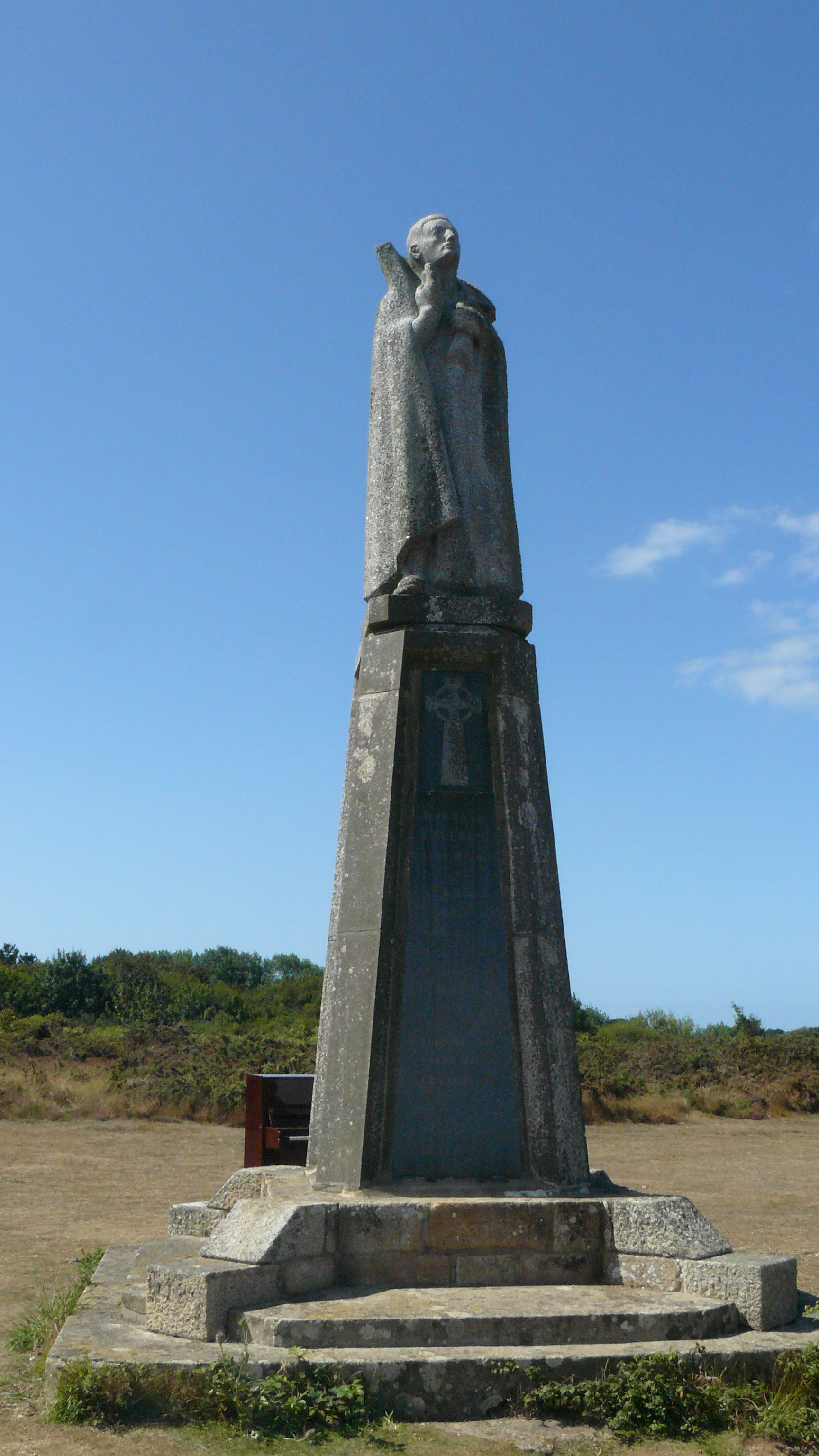 Statue de l'écrivain et soldat Jean-Pierre Calloc'h.